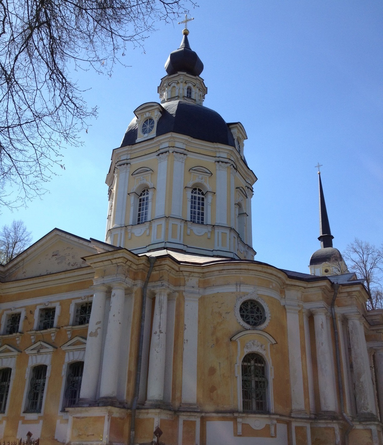 Церковь Спаса Нерукотворного в селе Вороново